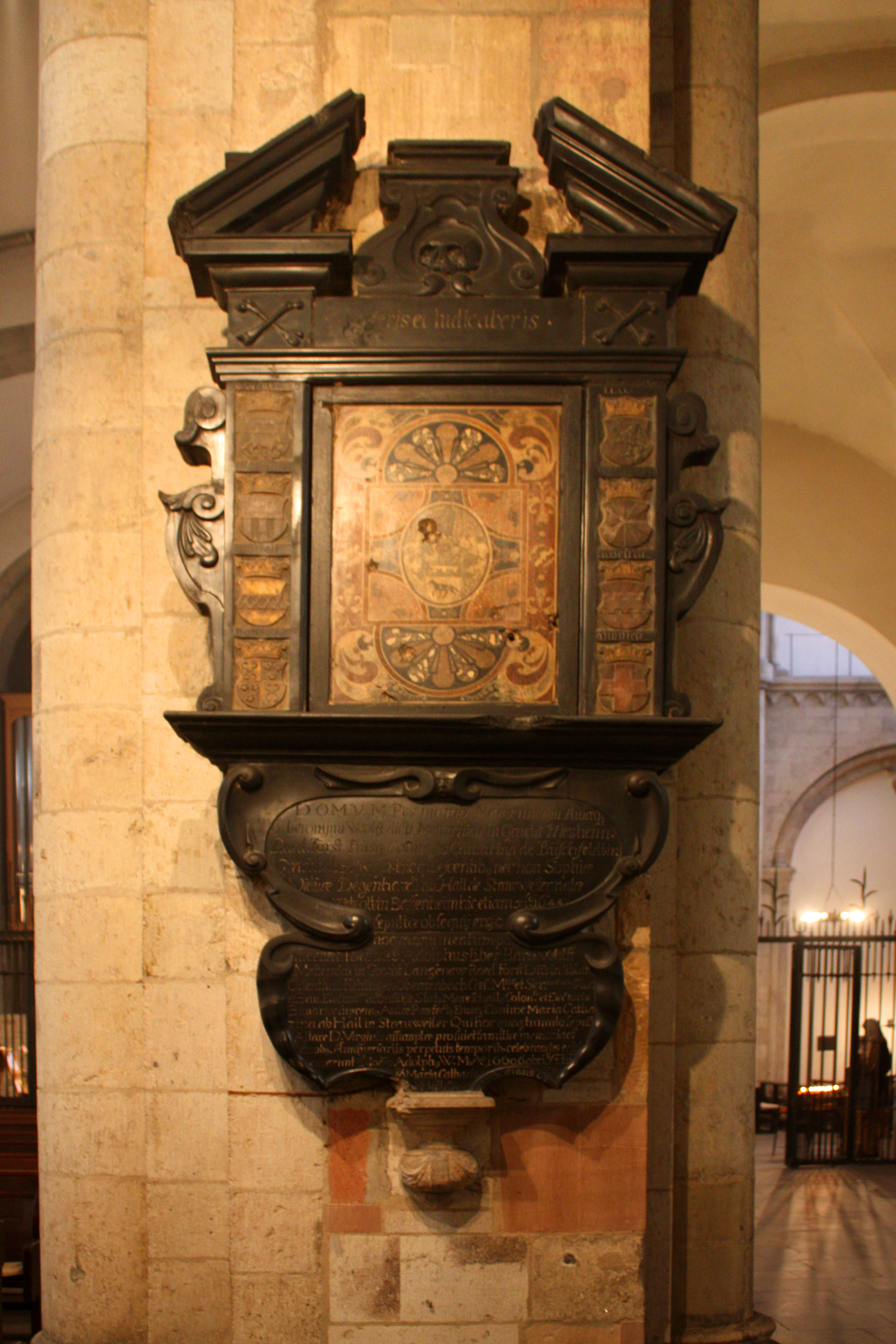 Epitaph des 17. Jahrhunderts der Familie Wolf-Metternuch. St. Aposteln, Köln